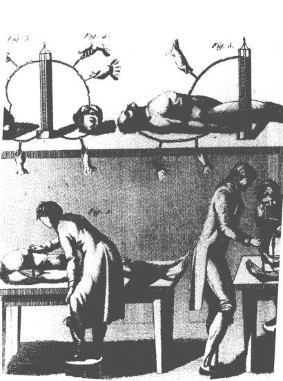 George Foster